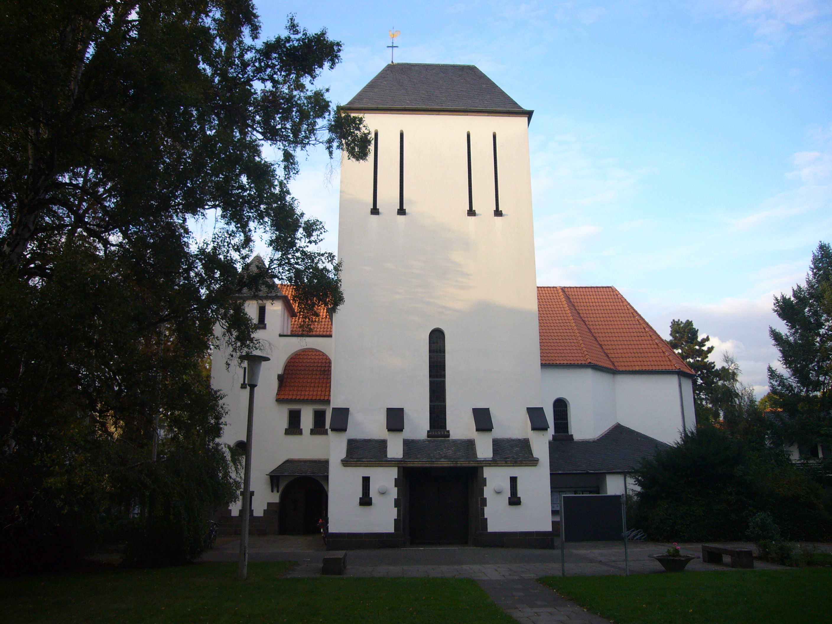 Die katholische Pfarrkirche Herz-Jesu in Bad Godesberg, Beethovenallee, Godesberg-Villenviertel